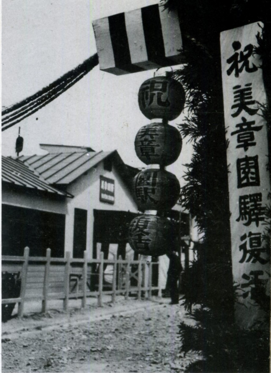 阪和線美章園駅営業再開(大阪市阿倍野区)